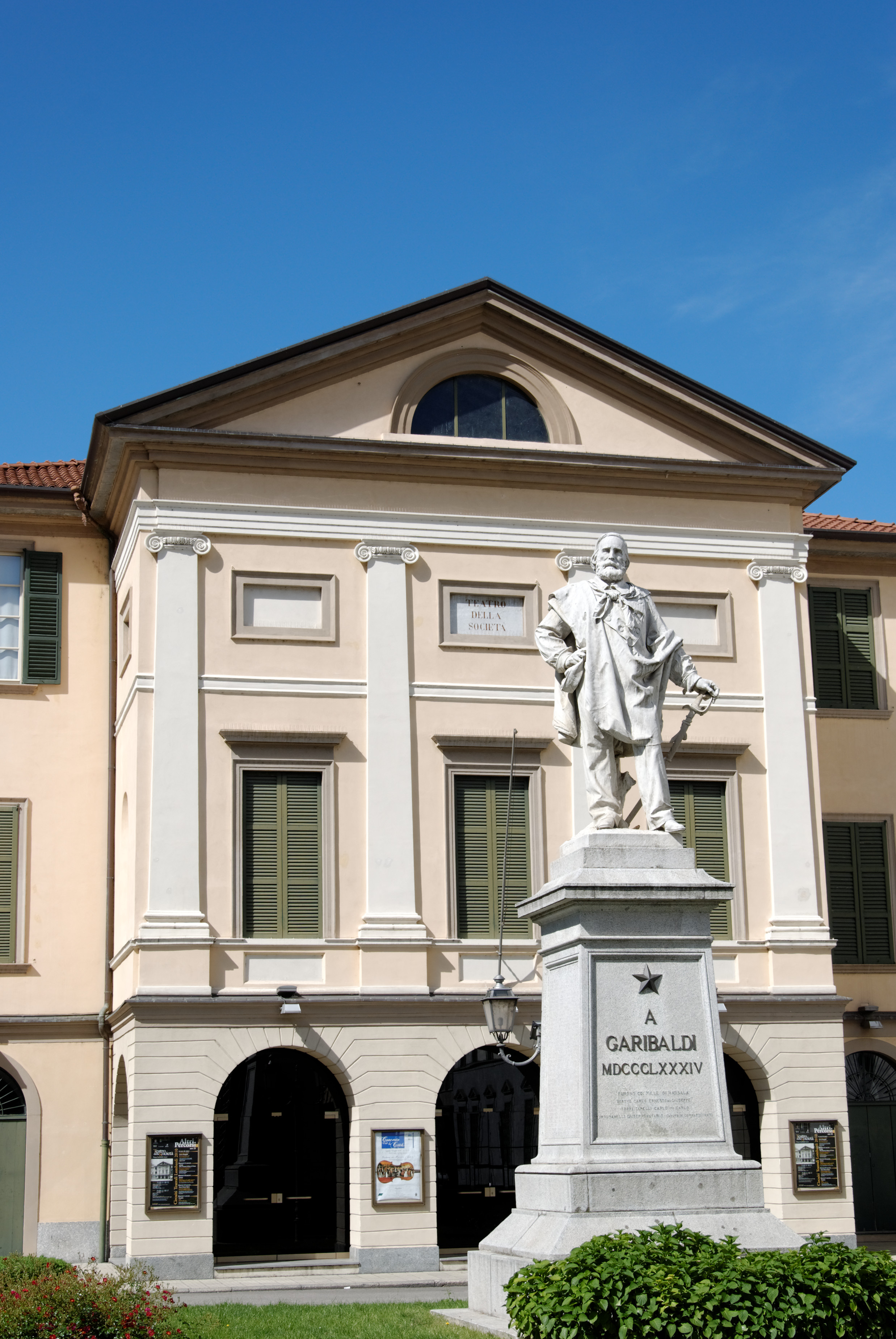 Ingresso del teatro della Società a Lecco